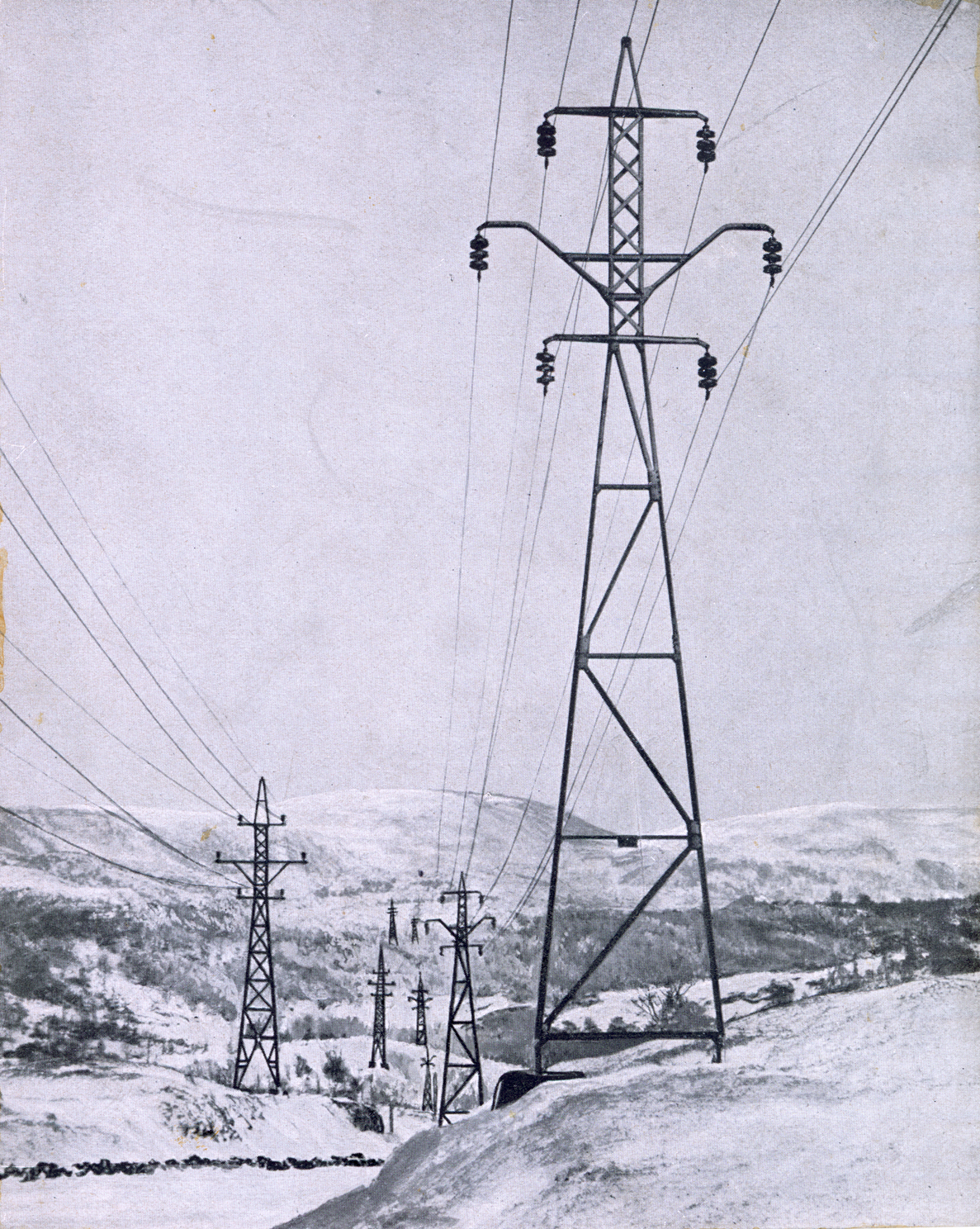 Kraftledning Samnanger-Bergen. Elektrisitetsdirektoratet. Dato: xx.xx.xxxx.